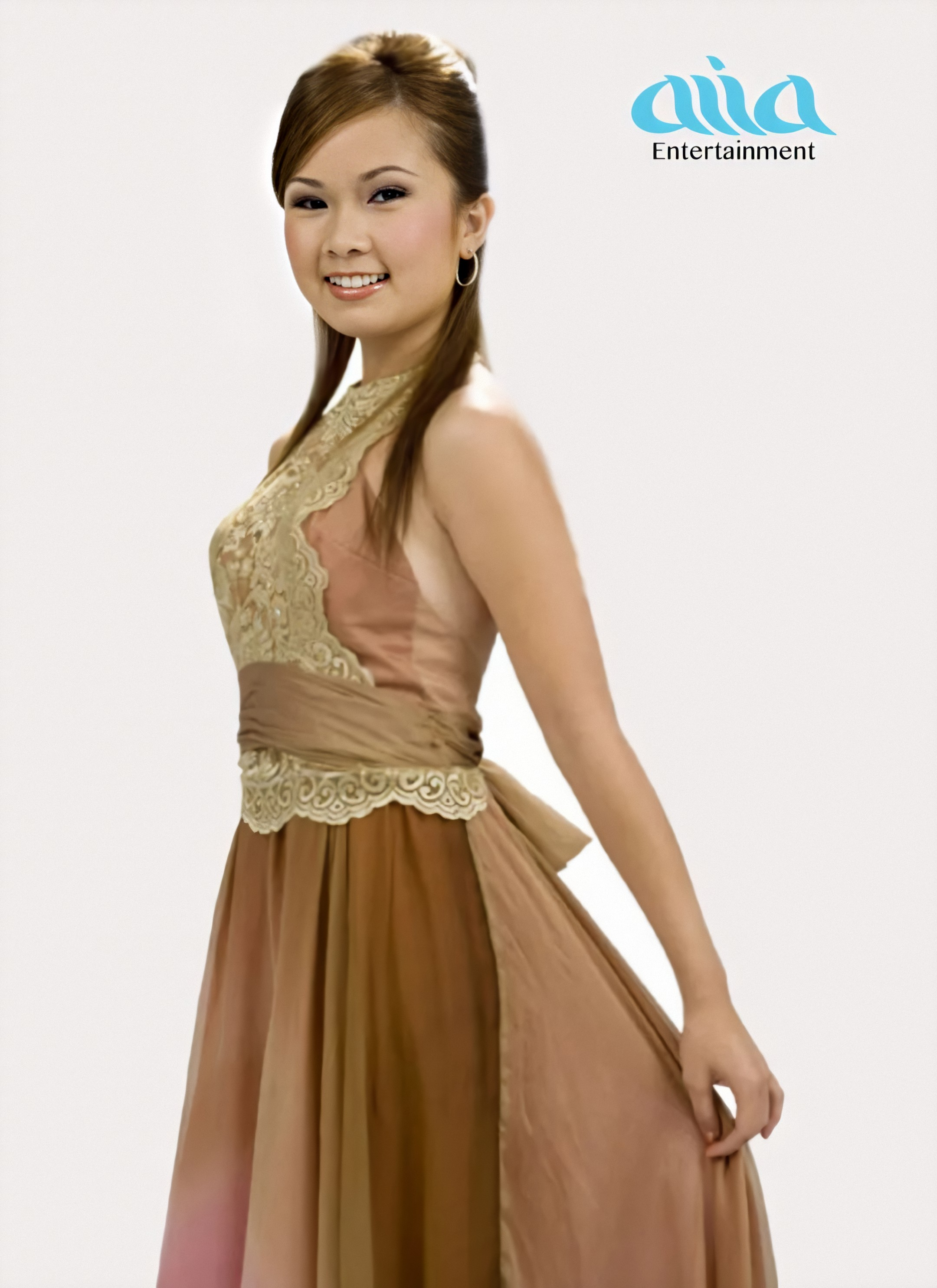 Thai Doanh Doanh in Asia Entertainment DVD 52